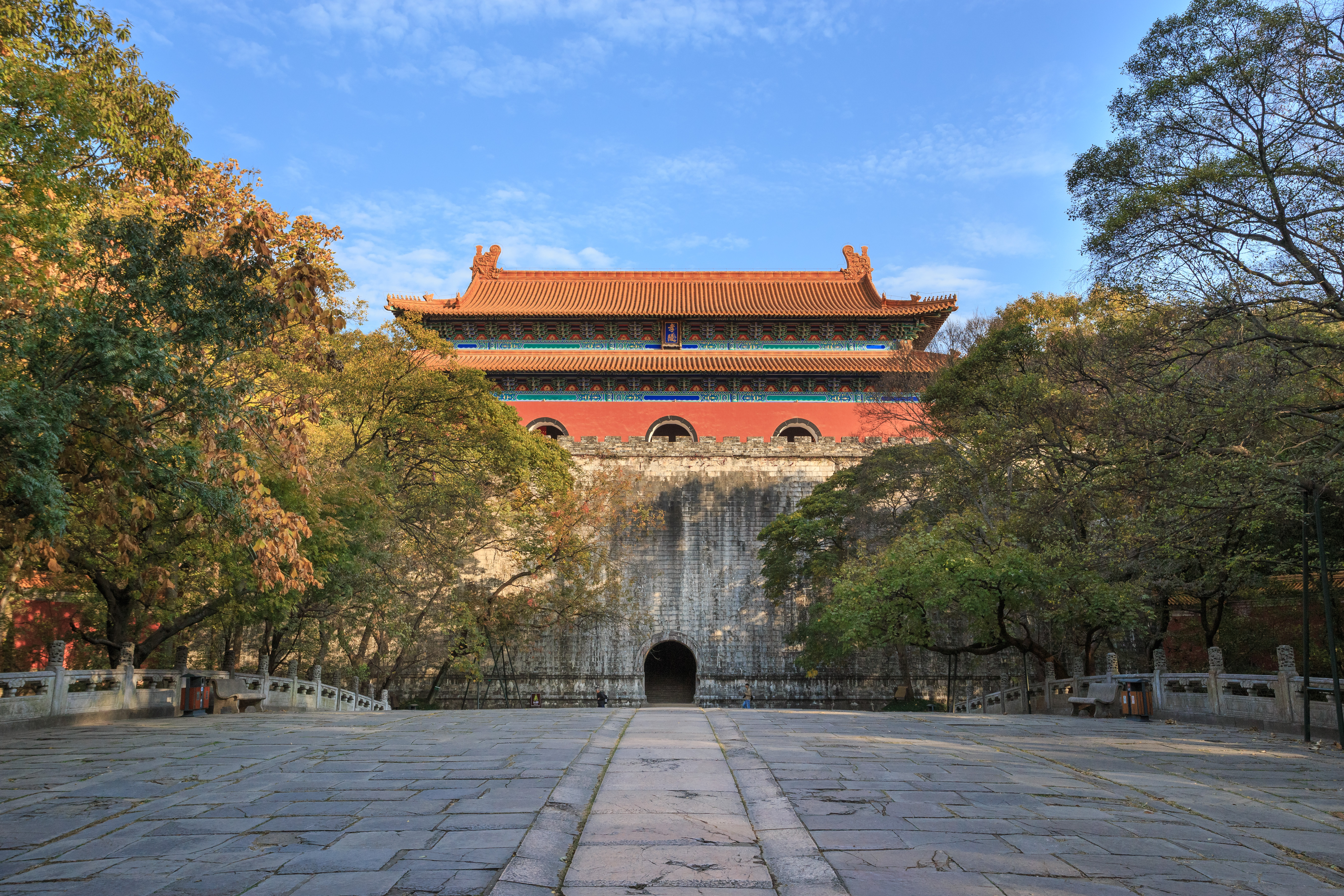 明孝陵明楼